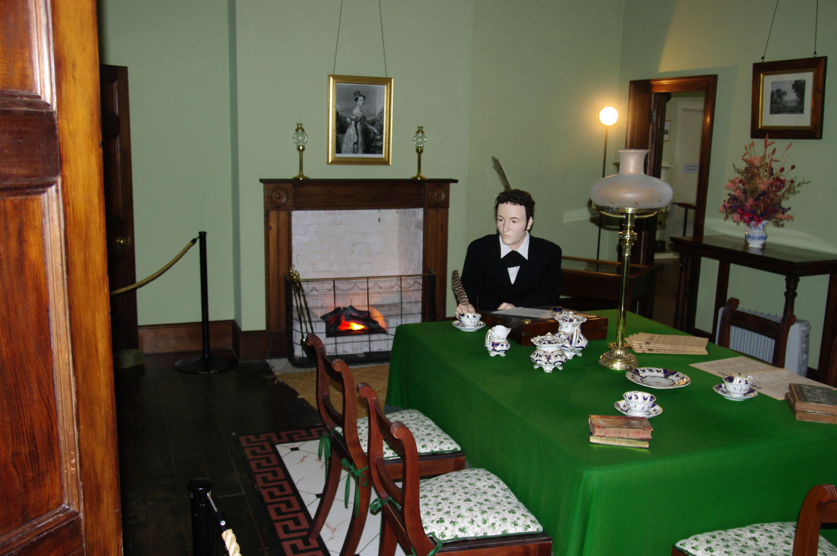 In Treaty House von Waitangi, Paihia, NZL